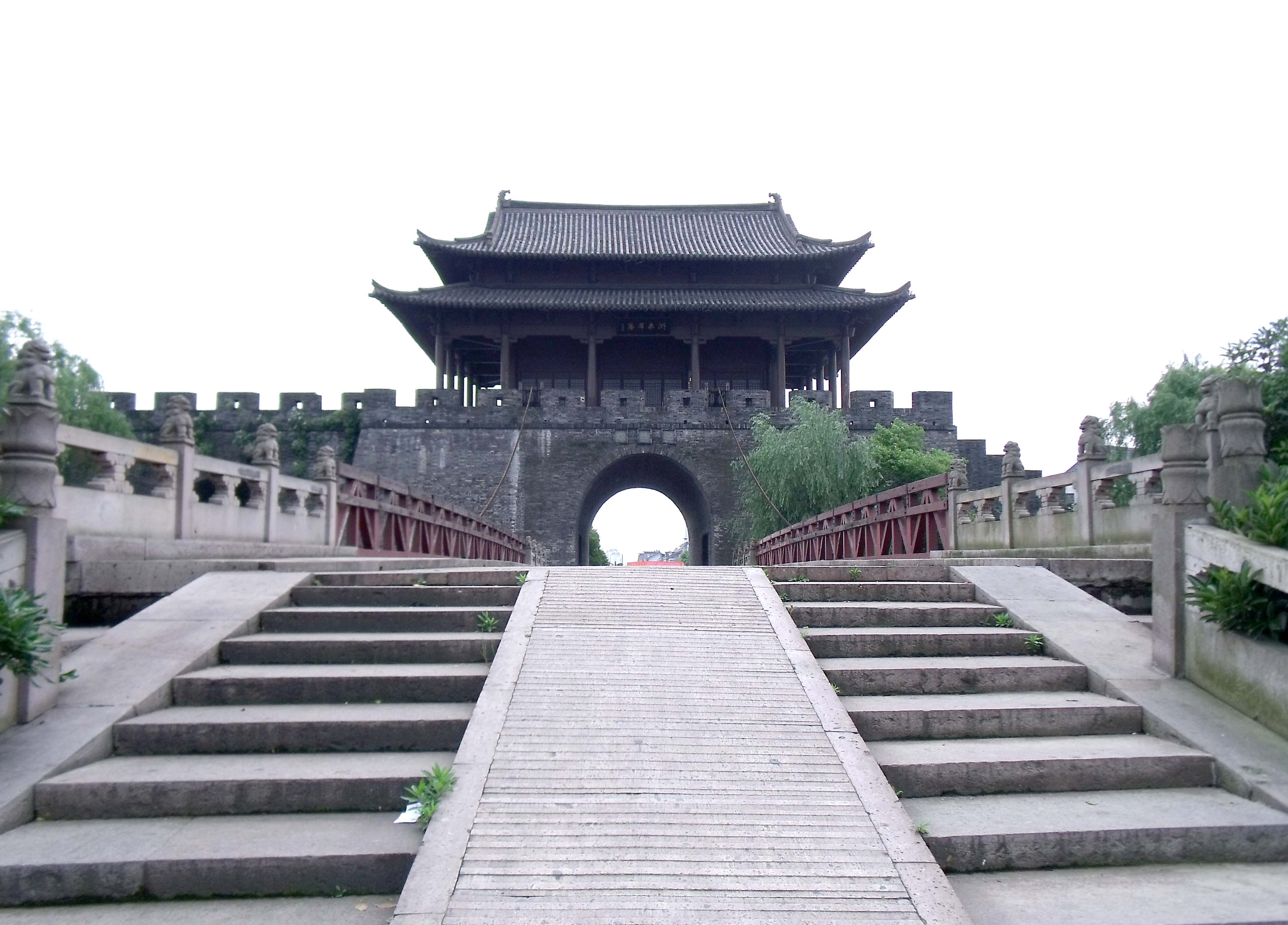 中文（中国大陆）: 绍兴迎恩门